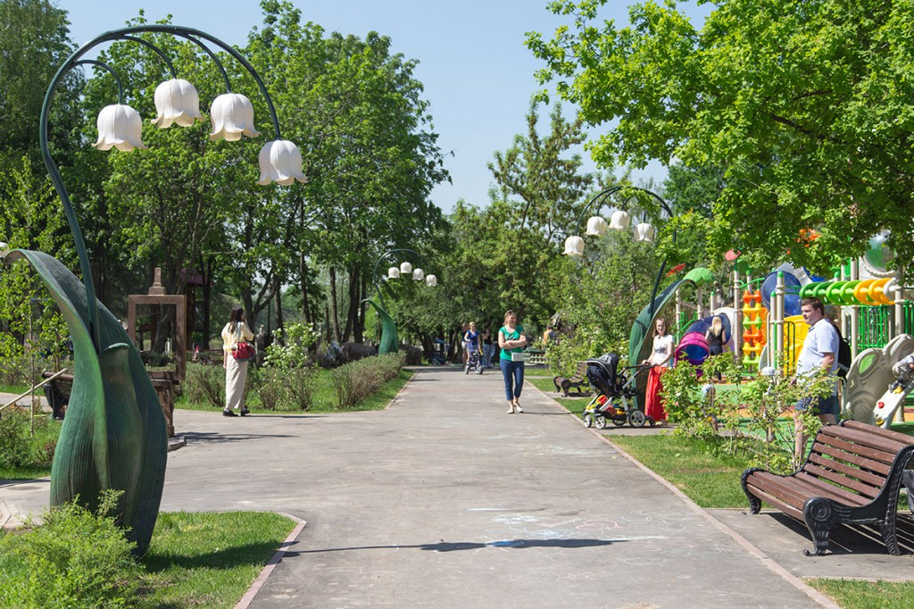 Посёлок совхоза имени Ленина (Ленинский район Московской области)